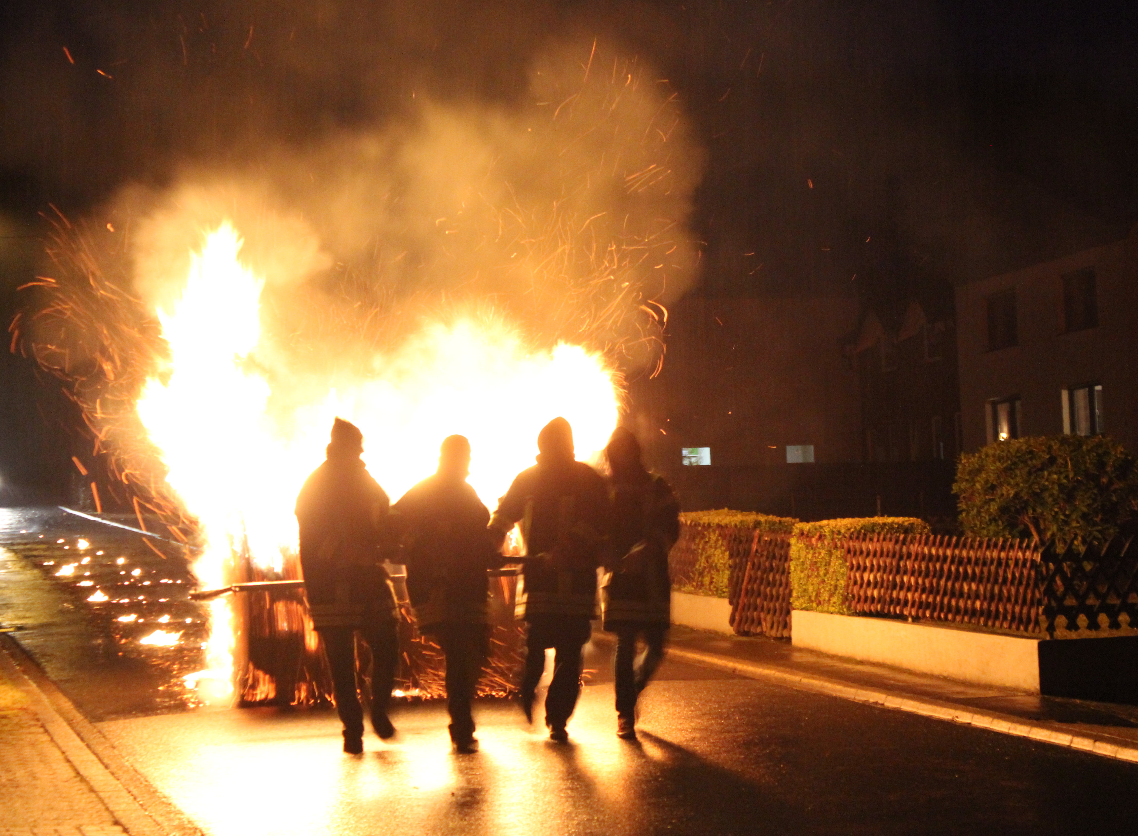 54597 Steffeln, Am Steffelberg. Die Junggesellen rollen am Vorabend des ersten Fastensonntages ein brennendes Feuerrad, das sogenannte "Freudenrad", vom Abhang des Steffelberges hinab in Tal. Das brennende Rad ist das Symbol für die Sonne, die mit ihrer Wärme den Winter vertreiben soll. Aufnahme von 2017.